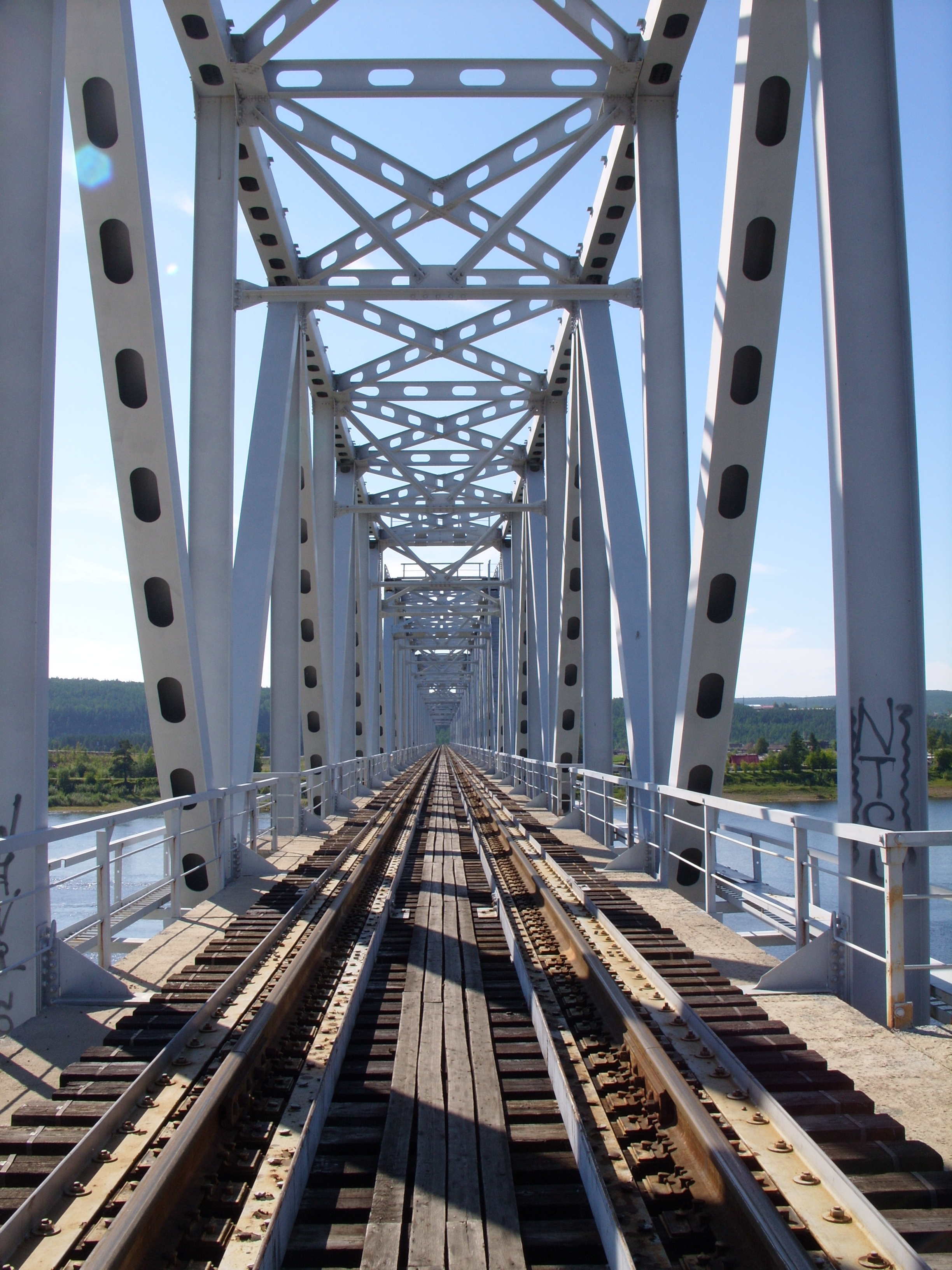 Вид с северной стороны. Снимок августа 2011 г.